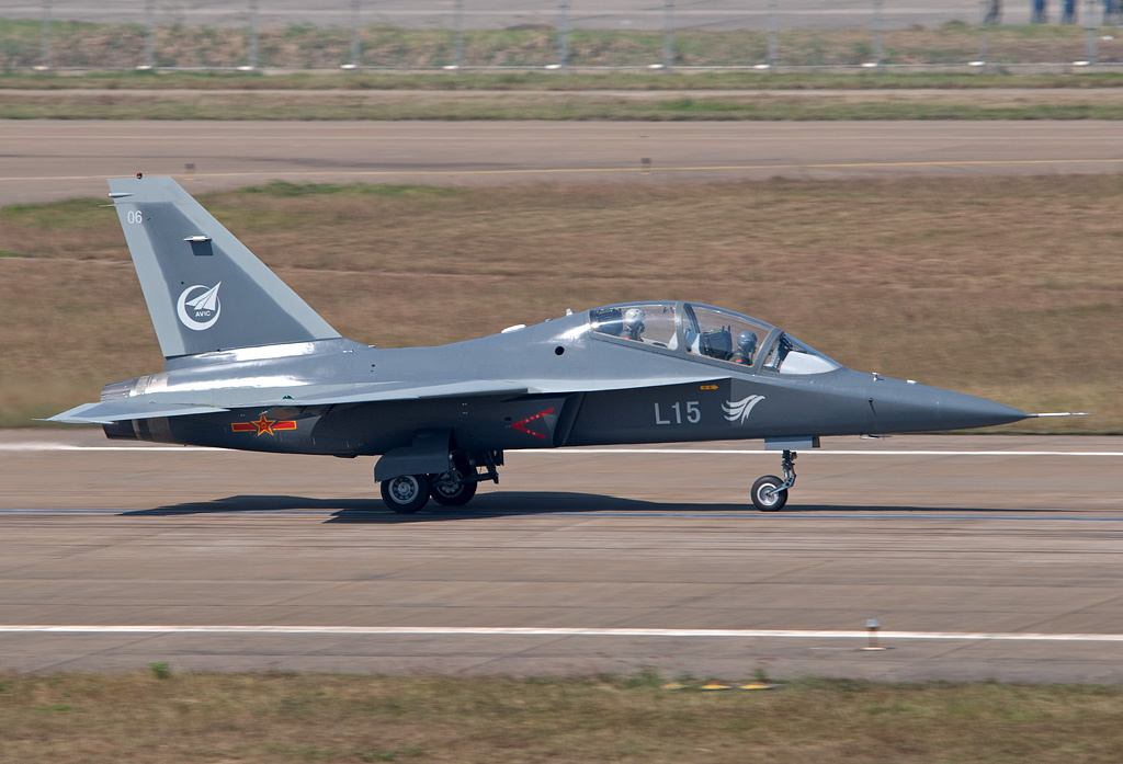 at Zhuhai - Sanzao (ZUH / ZGSD)